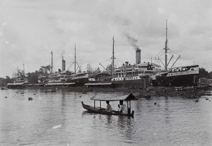 foto. Vooraan ligt S.S. Swaerdecroon in de met waterhyacinten bezaaide Martapura-rivier.. Schepen van de KPM langs de kade aan de Martapura-rivier, Bandjermasin